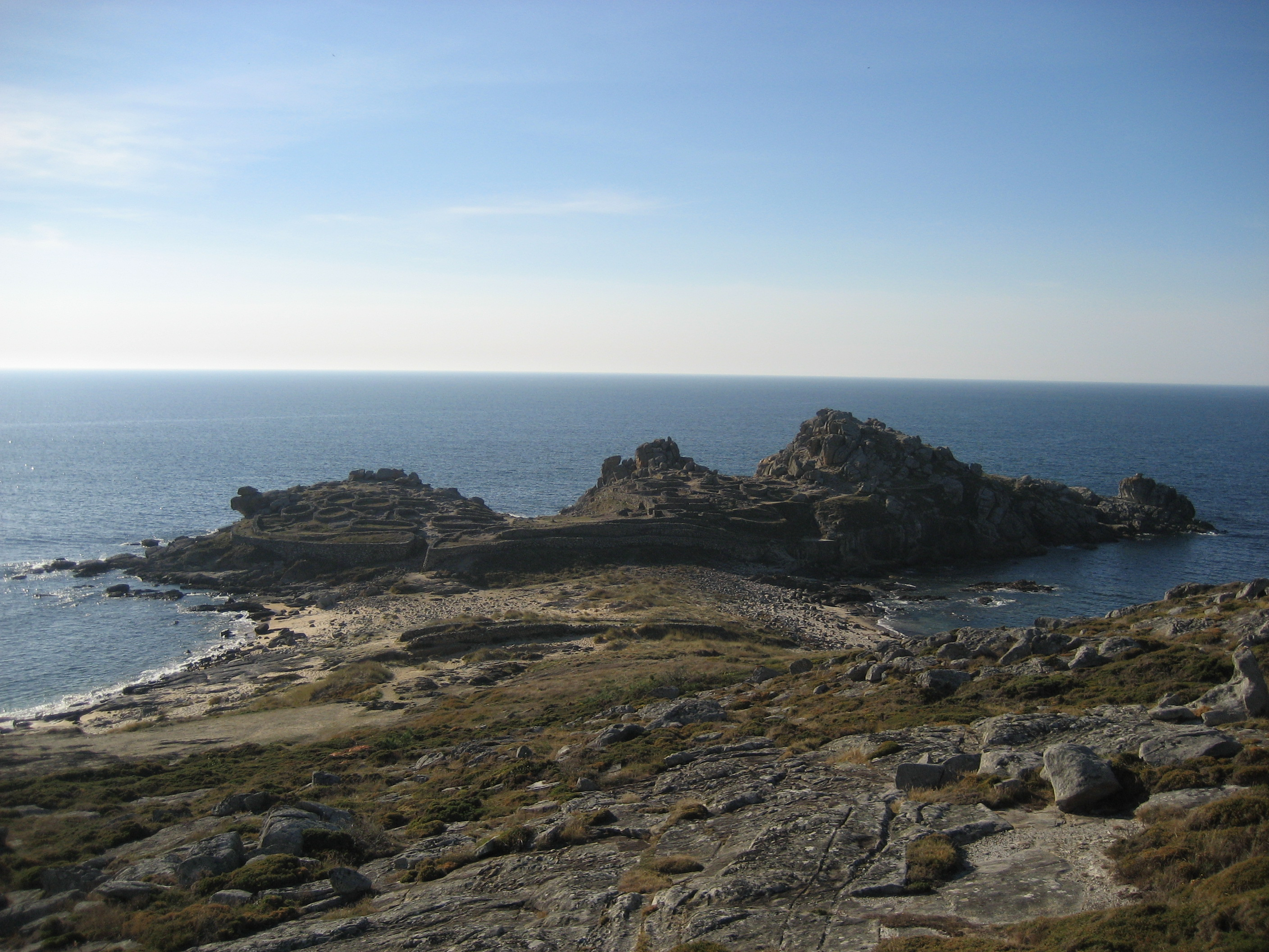 Castro de Baroña - Porto do Son